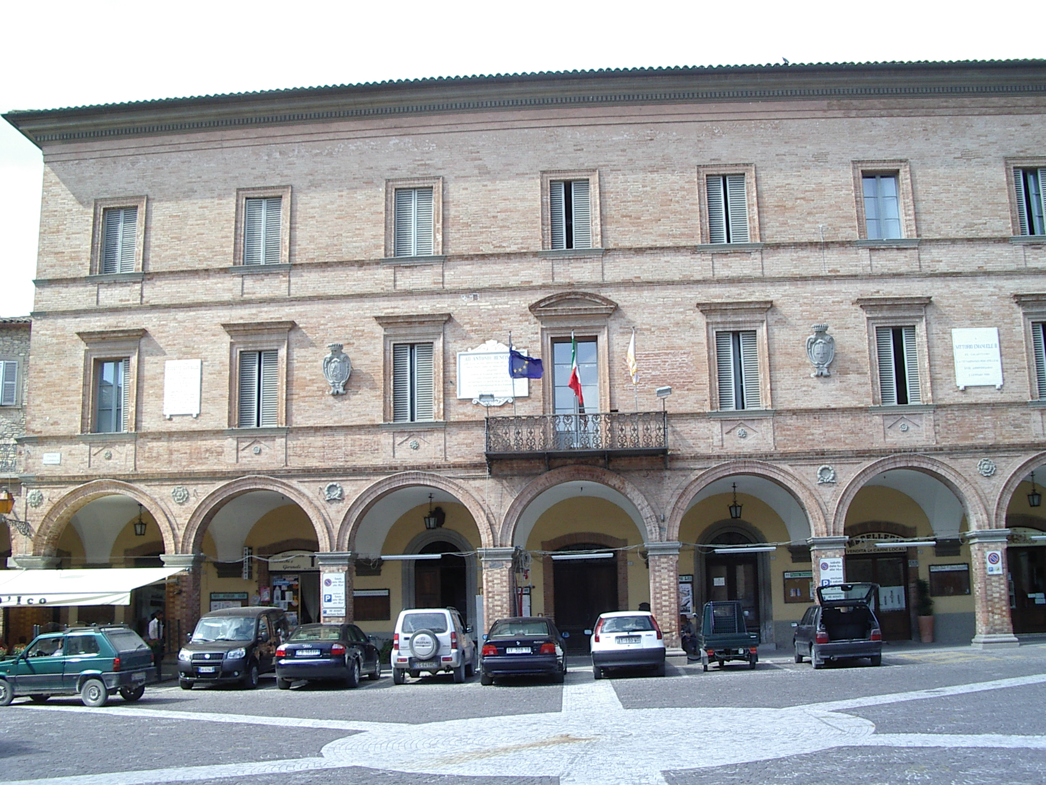 Palais Communal Mercatello sul Metauro Marches Italie